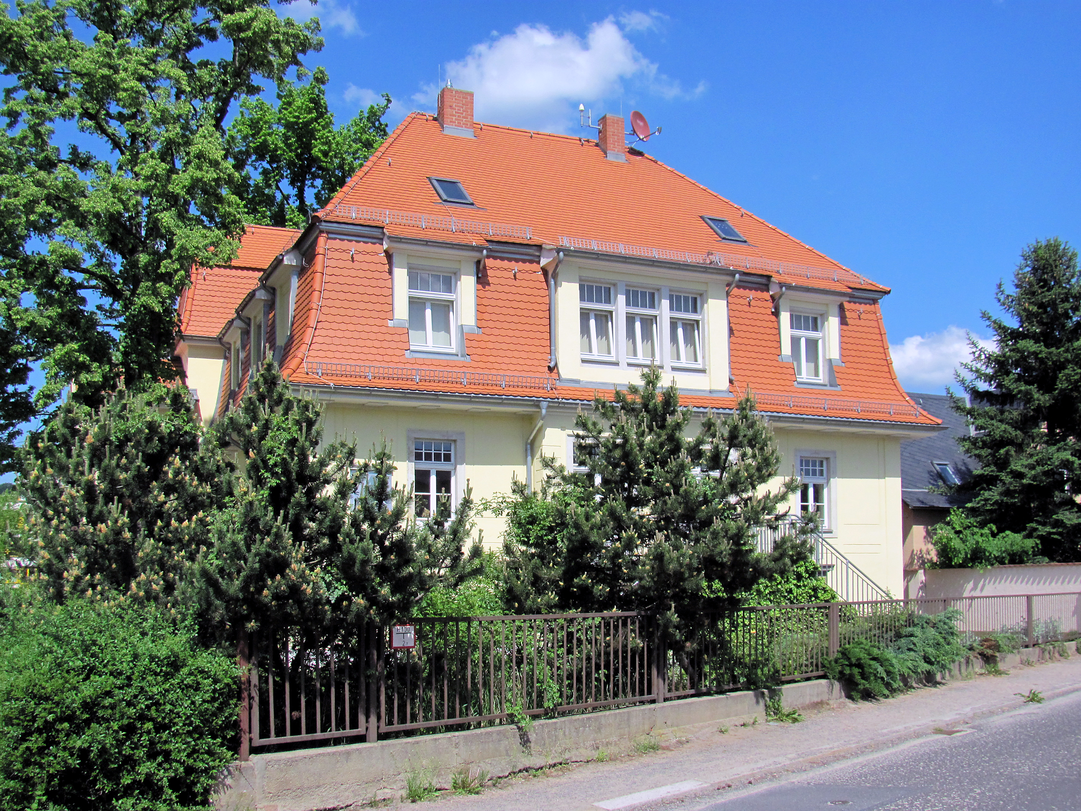 Radebeul-Niederlößnitz, Lydiahaus